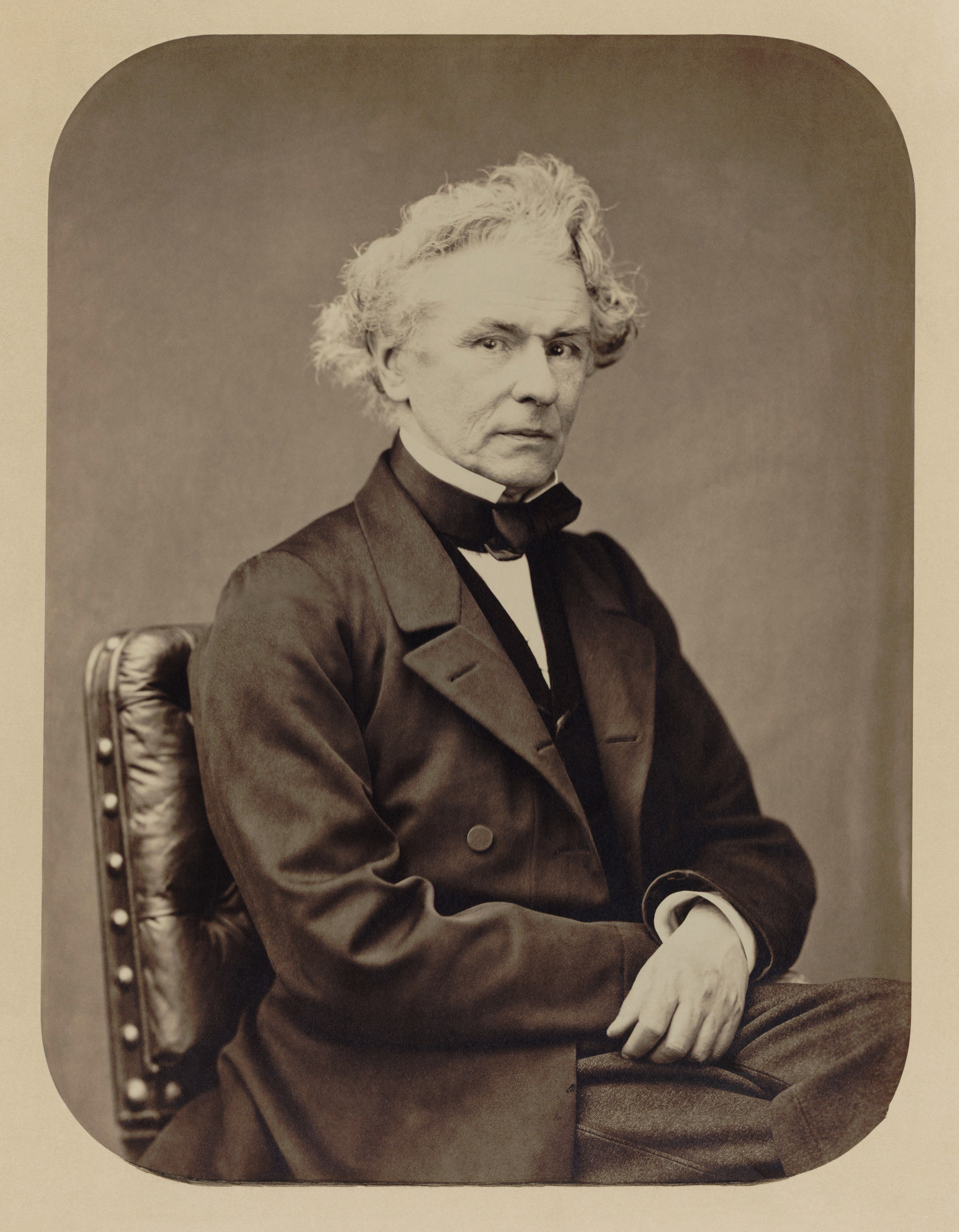 Henri Reber / portrait photographique par Pierre Petit